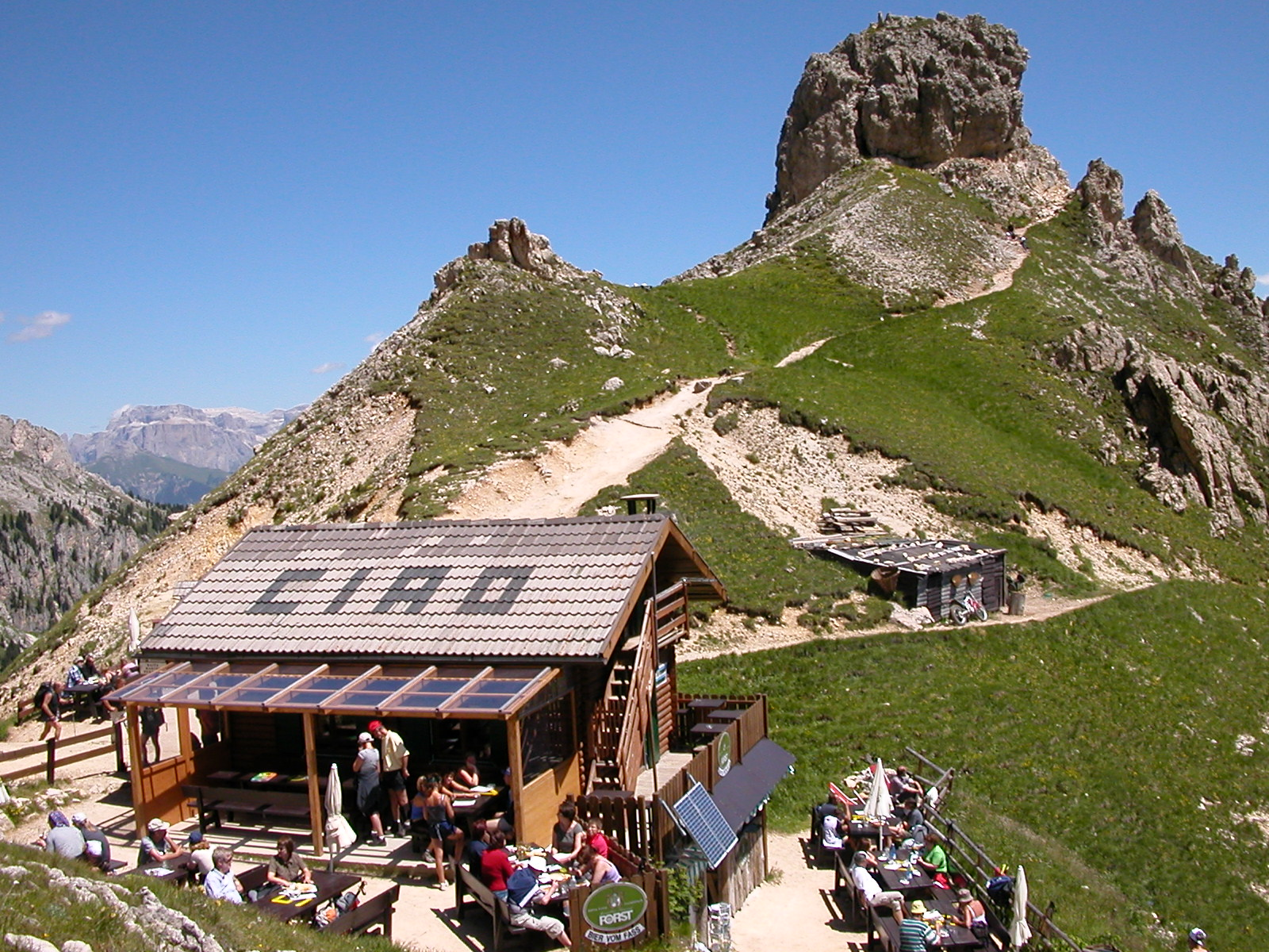 Gruppo del Catinaccio - Baita Marino Pederiva